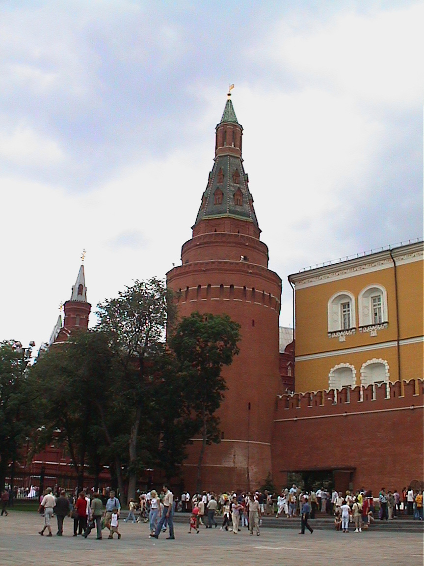 Tour d'angle de l'Arsenal (Kremlin de Moscou